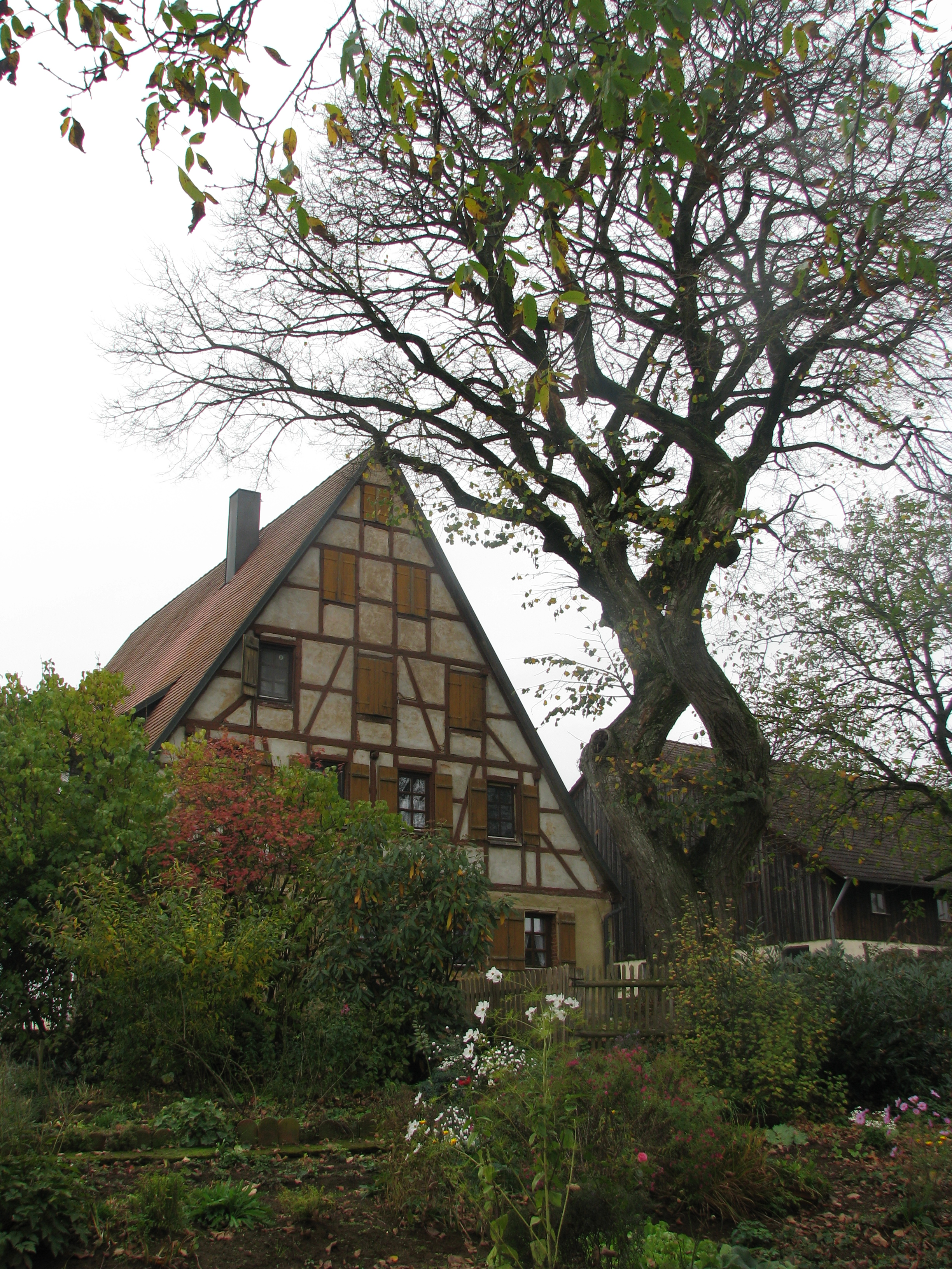 Gspannberg, Ortsteil von Berg bei Neumarkt in der Oberpfalz, Ehemaliges Wohnstallhaus mit Fachwerkgiebel